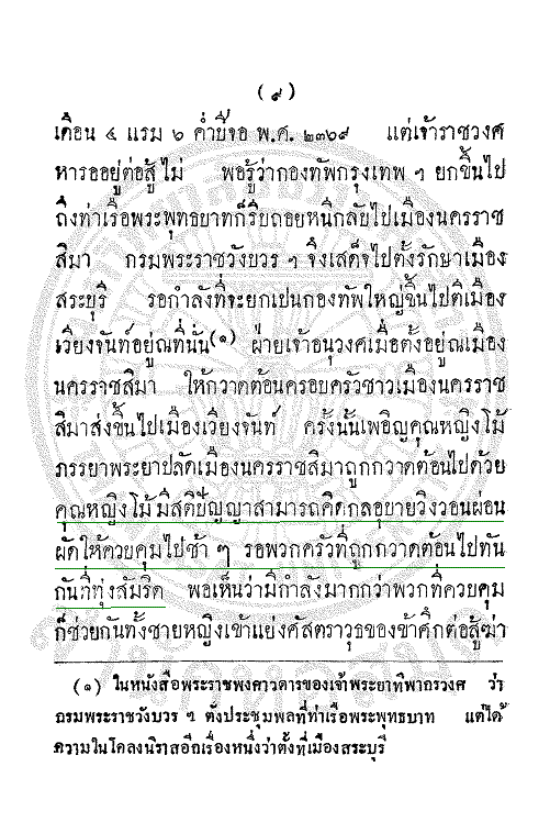 Captured from a page in "จดหมายเหตุปราบกบฏเวียงจันทน์"(in Thai) A Thai Cronicle from King Rama 3 era, printed in 1925